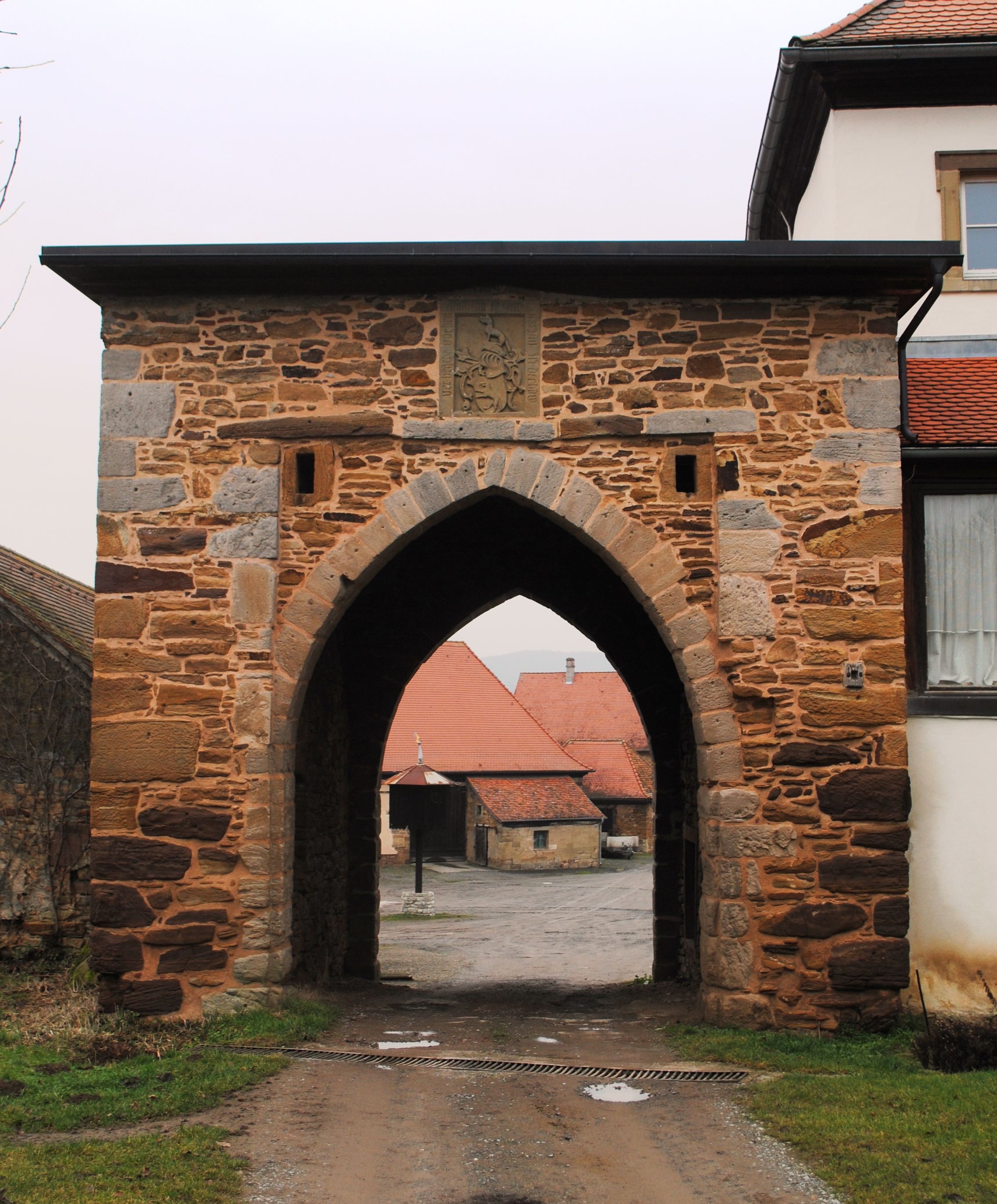 Torbogen, Schloss Bimbach, Prichsenstadt-Bimbach